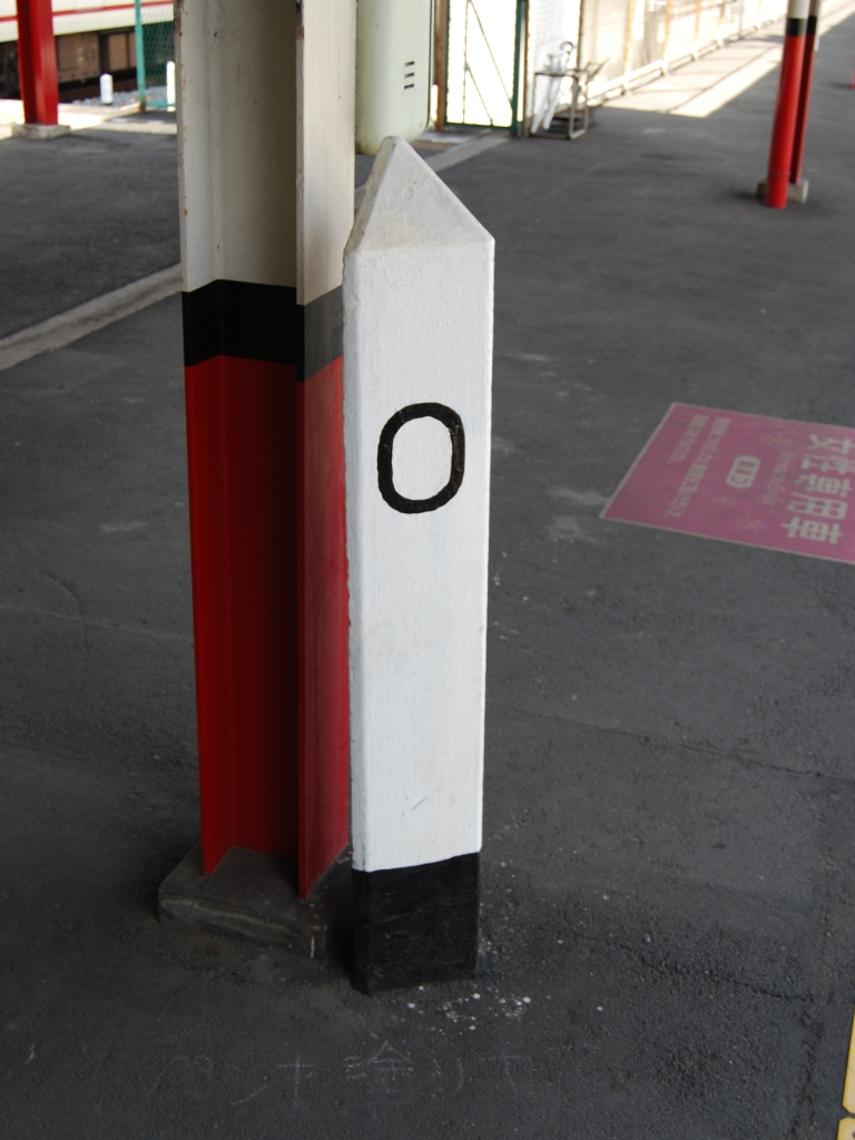 東武鉄道東武動物公園駅2・3番線ホームに設置されている日光線0キロ距離標（2008/10/10撮影）